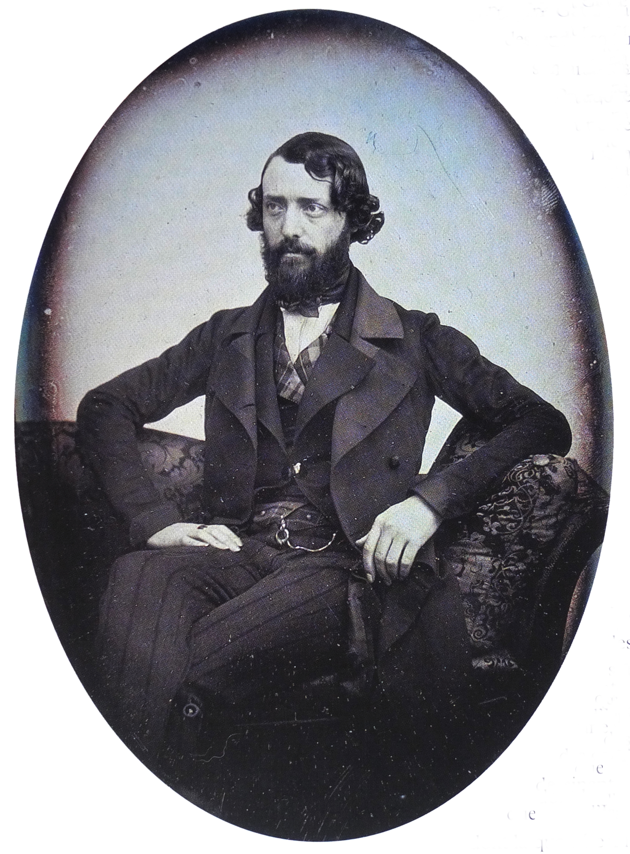 Ehgéne Violet-le-Duc, daguerréotype réalisé en 1848, auteur anonyme. Musée des monuments français.